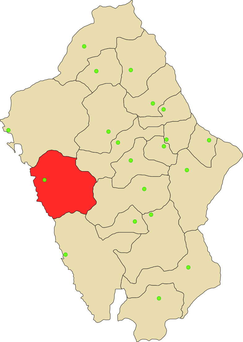 Provincia de Casma de departamento Ancash